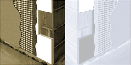 link My personal site